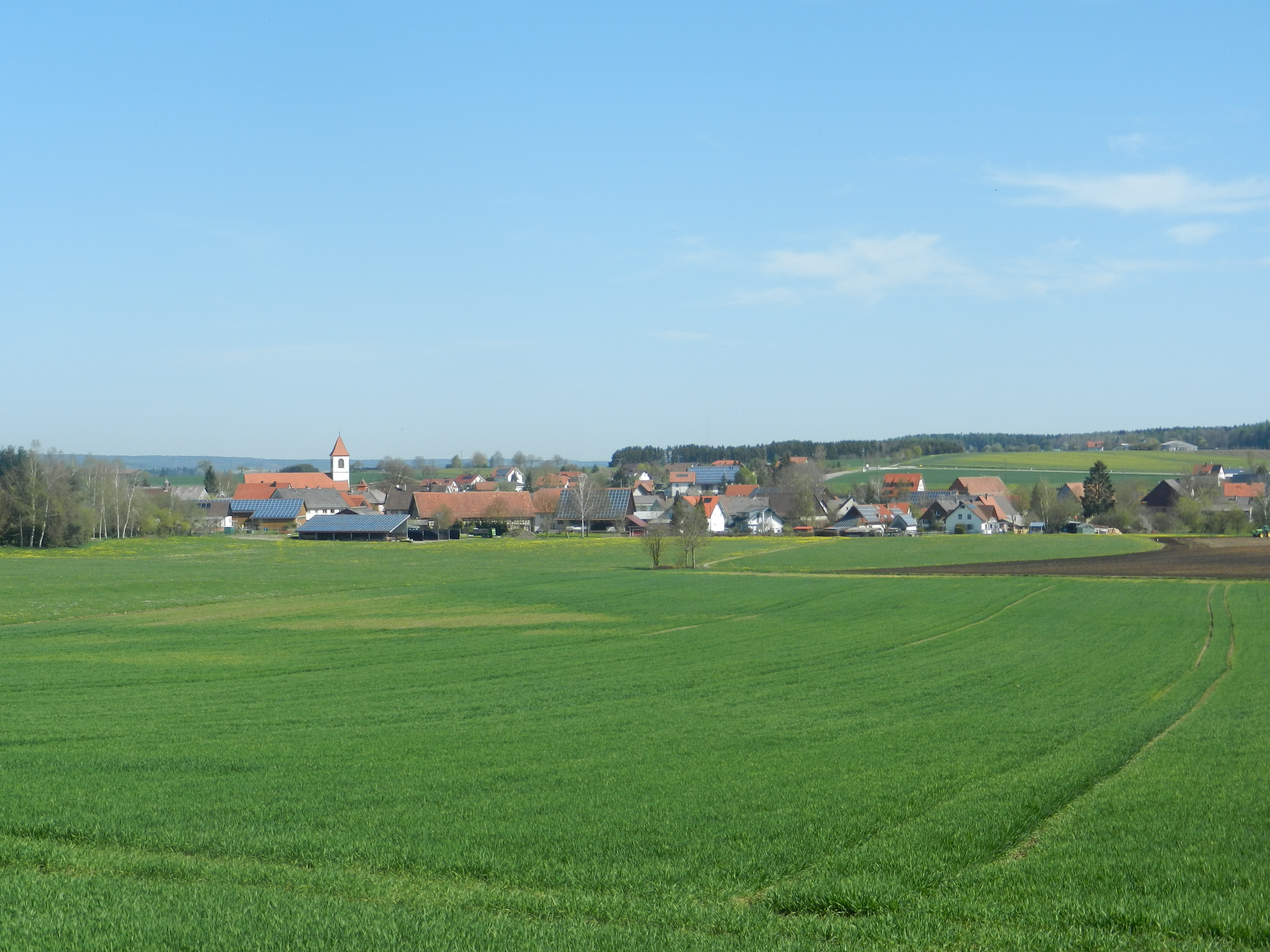 Sauldorf